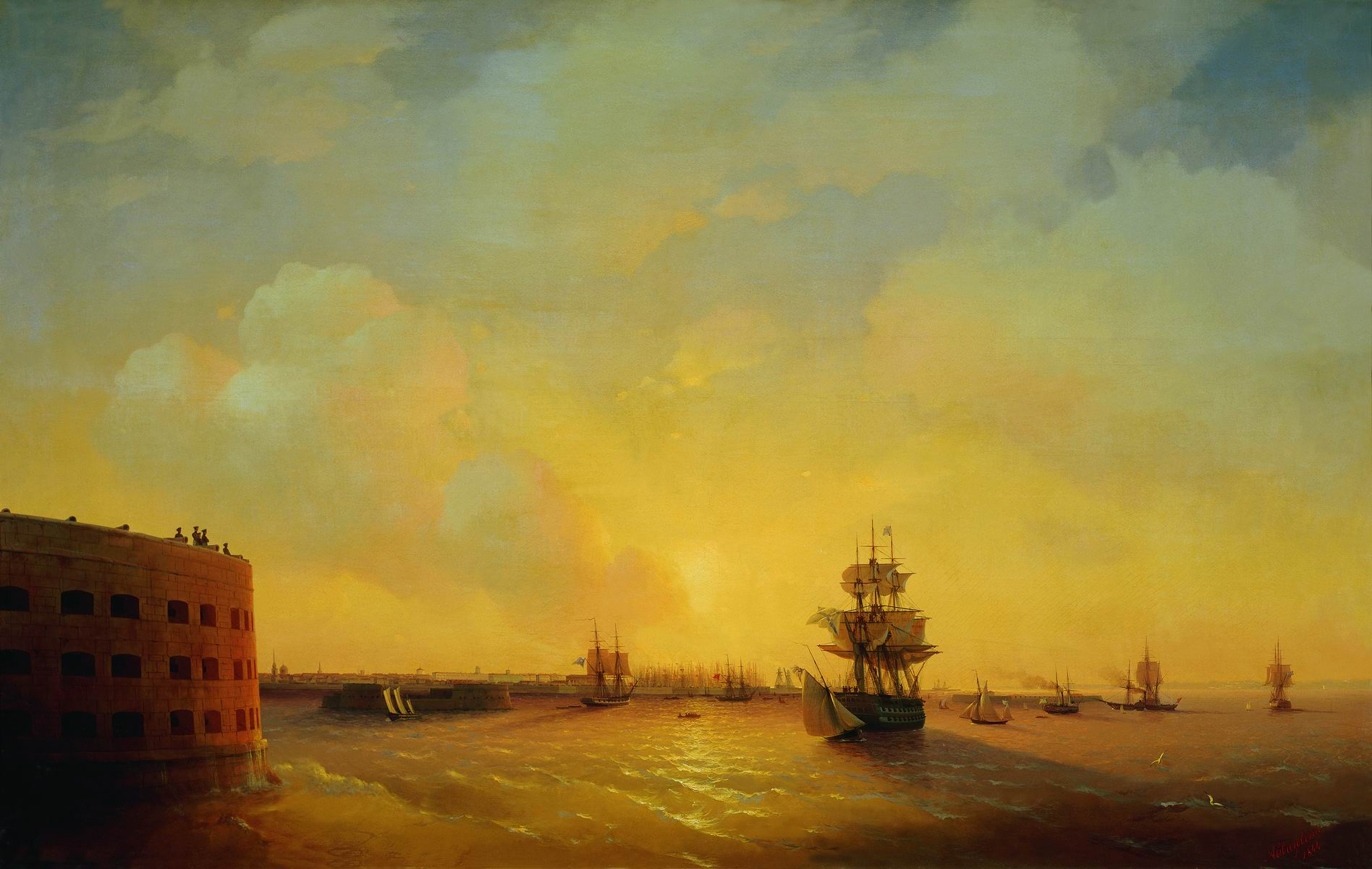 Кронштадт. Форт " Император Александр I". 1844 Холст, масло. 120х185. Центральный военно-морской музей, Санкт-Петербург